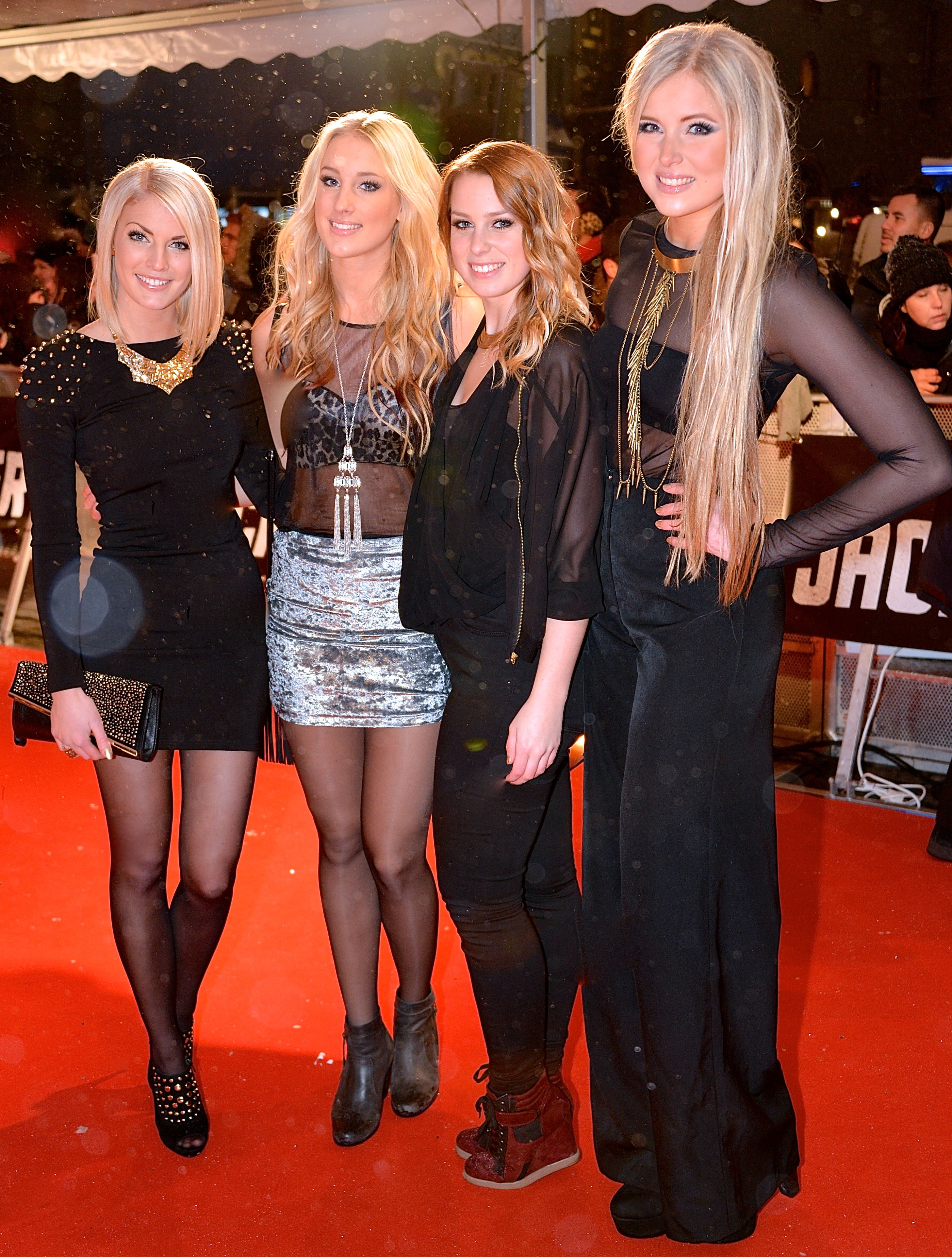 Timoteij på filmpremiären av Jack Reacher på Filmstaden Sergel i Stockholm den 11 december 2012.